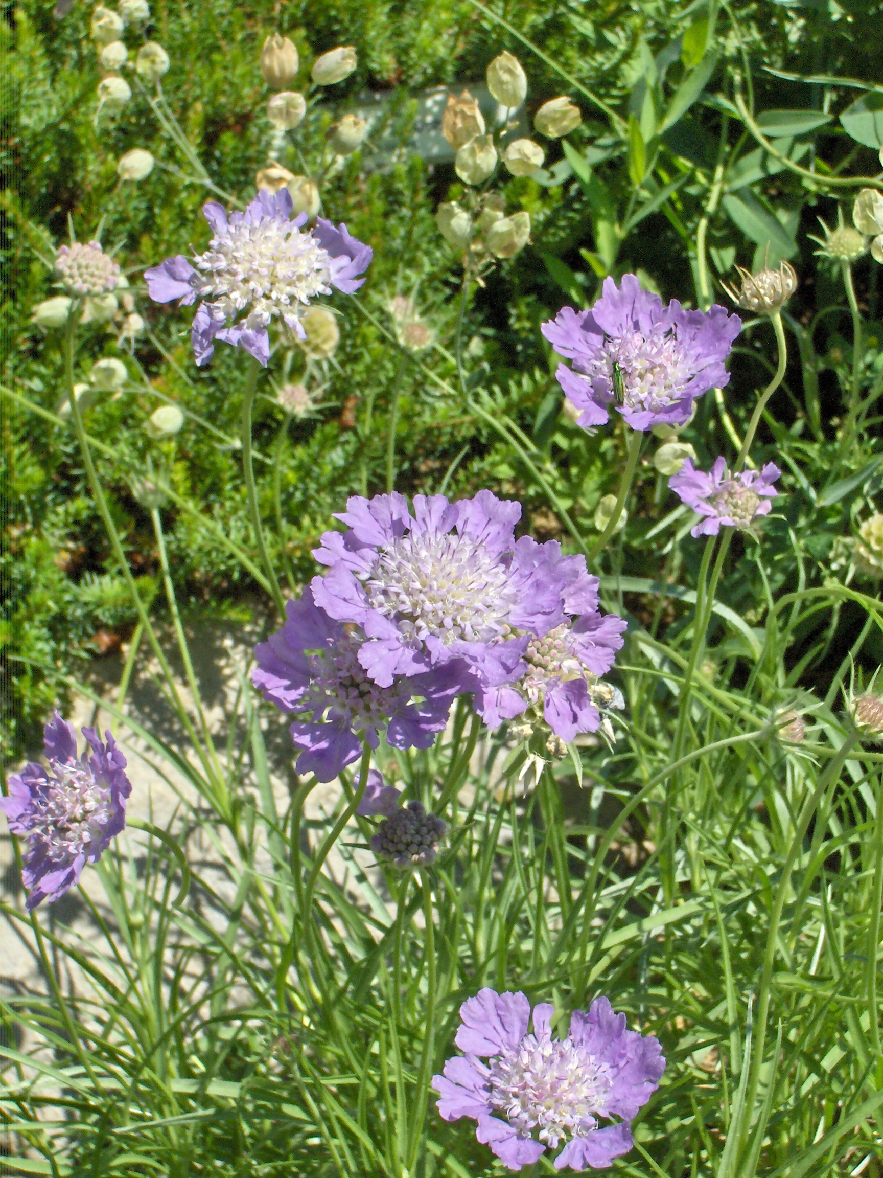 Scabiosa graminifolia